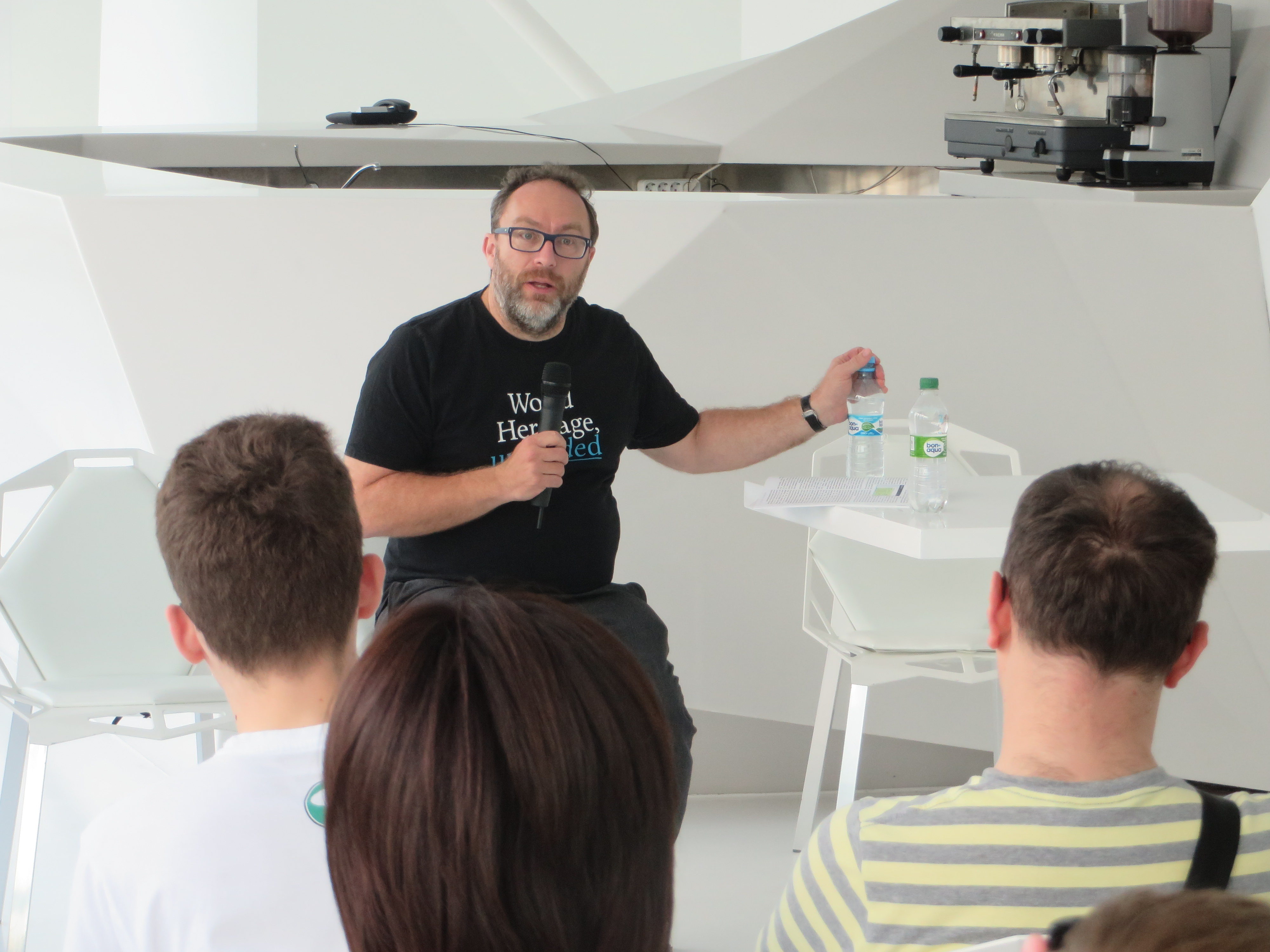 Джиммі Вейлз спілкується з українськими вікіпедистами